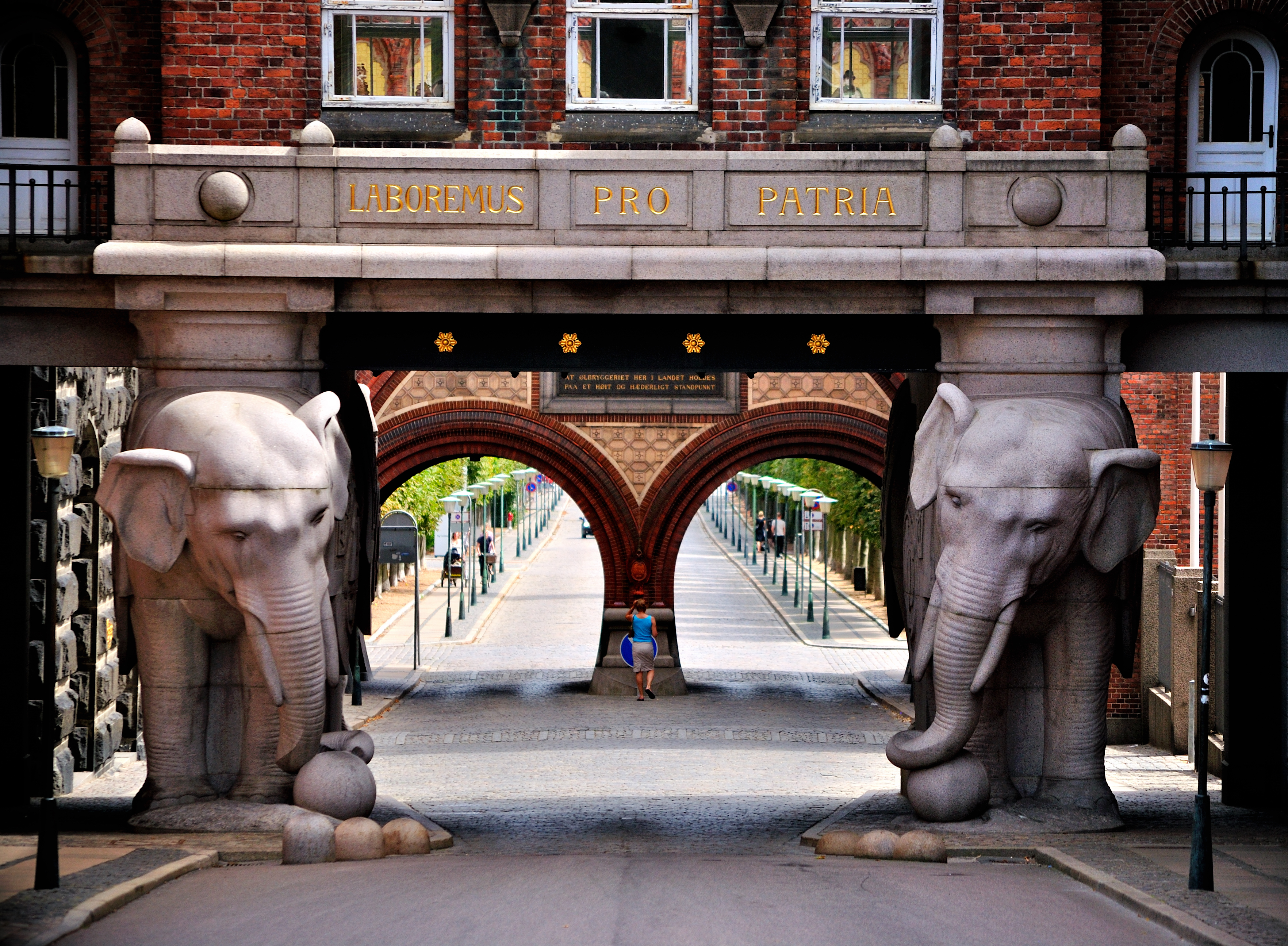 Elephant Gate at Carlsberg Brewery in Copenhagen, Denmark